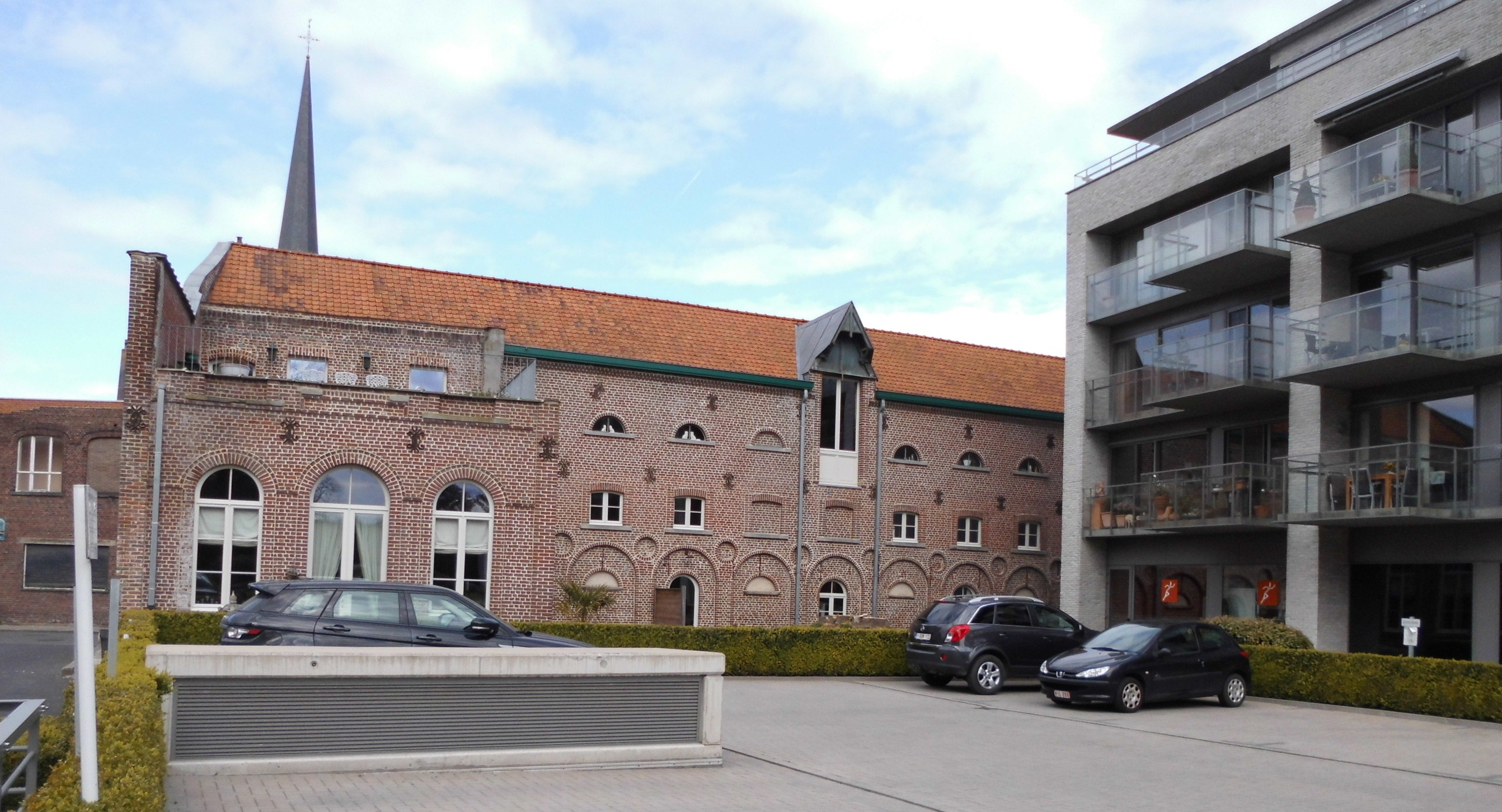 Binnenkoer van de voormalige Brouwerij Carpentier - Papestraat - Izegem - West-Vlaanderen - België